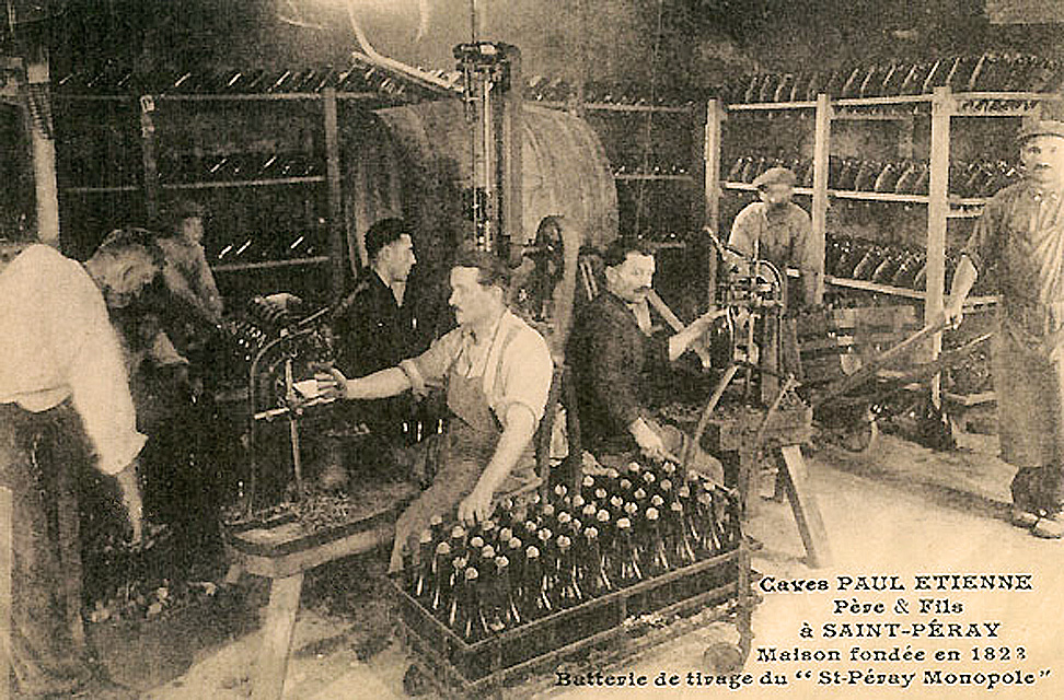 Caves Paul Étienne : Tirage et embouteillage du saint-péray